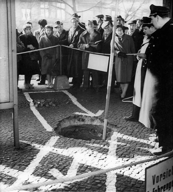 Title: Berlin, S-Bahnhof Wollankstraße, Fluchttunnel Factual corrections and alternative descriptions are encouraged separately from the original description. Additionally errors can be reported at this page to inform the Bundesarchiv. Original historic description: Zentralbild-Repro-So-At-Sei-1.2.1962. Gefährliche Provokation an der Staatsgrenze der DDR-Durch Agentenschleuse Eisenbahnverkehr aufs äusserste gefährdet-Ein neues eklatantes Beispiel für die friedensgefährdende Rolle der Westberliner Frontstadt-Politik ist am 1.2.1962 auf einer internationalen Pressekonferenz in Berlin enthüllt worden. Vor in- und ausländischen Journalisten, darunter Vertretern westdeutscher Zeitungen informierte der Minister für Verkehrswesen der DDR, Erwin Kramer, auf dem Gelände des S-Bahnhofes Wollankestrasse über die ungeheuerliche Tatsache, dass Westberliner Banditen unter gröbster Verletzung der Staatsgrenze der DDR durch die Gewölbe dieses Bahnhofes ein Stollensystem vorgetrieben haben. Durch die Anlage dieses Stollensystems sollten Agenten und Diversanten von Westberlin in das Gebiet der DDR eingeschleust werden. (Näheres s. ADN-Meldung Nr.211 u.f. vom 1.2.1962). UBz: Pressevertreter an der Einsturzstelle auf dem Bahnsteig. Die Mitte des Bahnsteiges hatte sich auf Grund der Arbeiten am Stellen gesenkt.